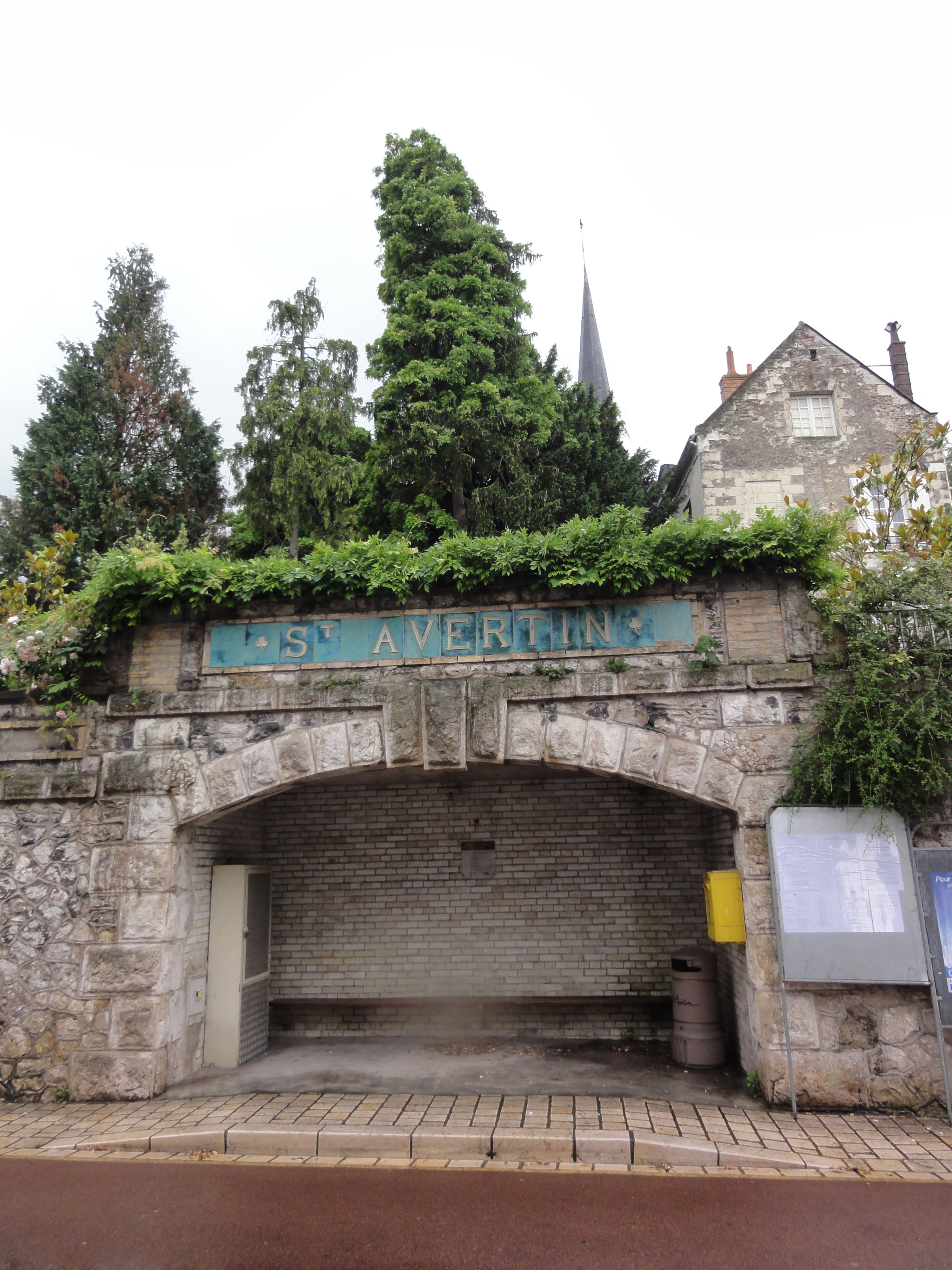 Saint-Avertin (Indre-et-Loire) ancienne halte tramway